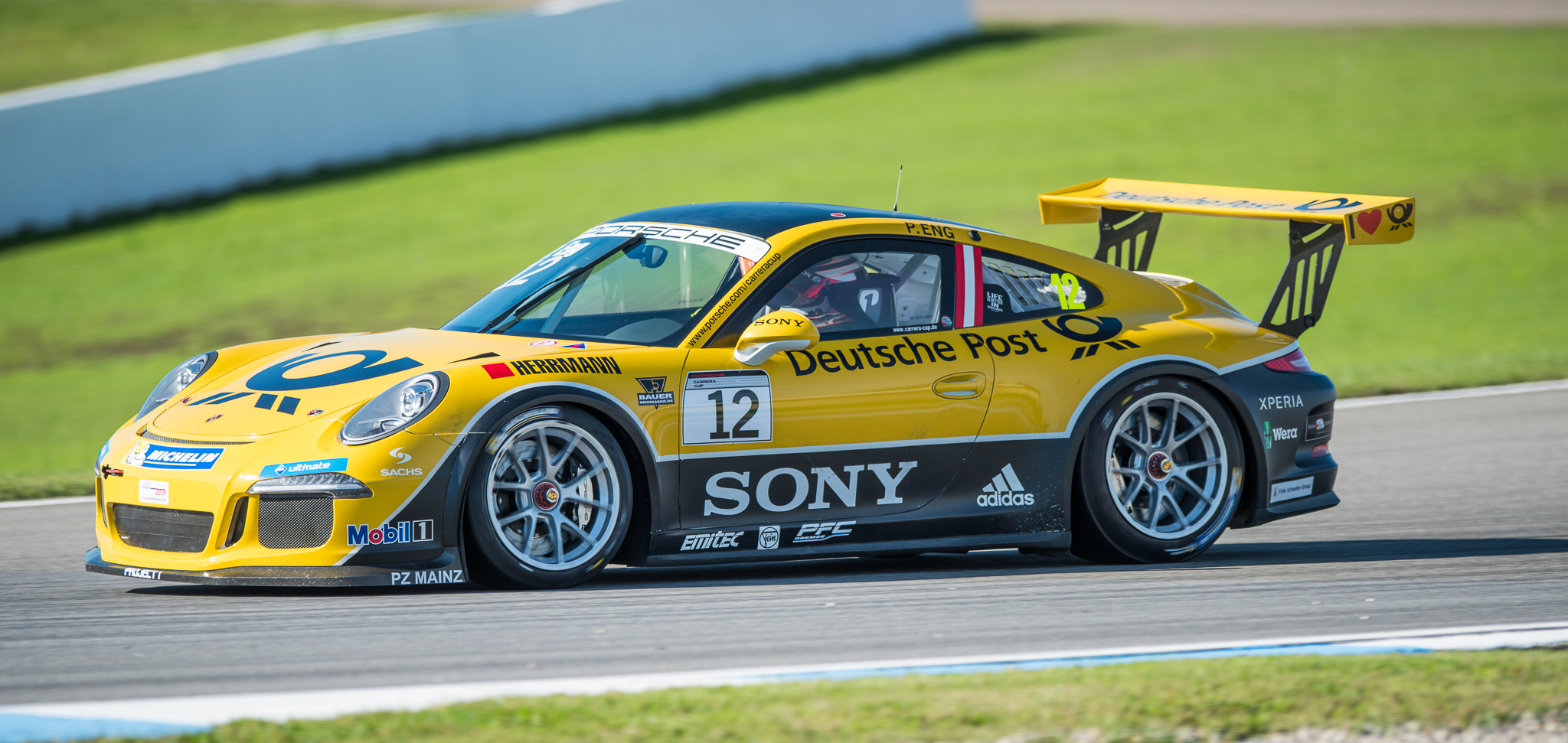 DTM,Deutsche Tourenwagen Masters,Hockenheimring,Motorsport,Philipp Eng,Porsche 911 GT3 Cup (Typ 991),Porsche Carrera Cup Deutschland,Team Deutsche Post by Project 1